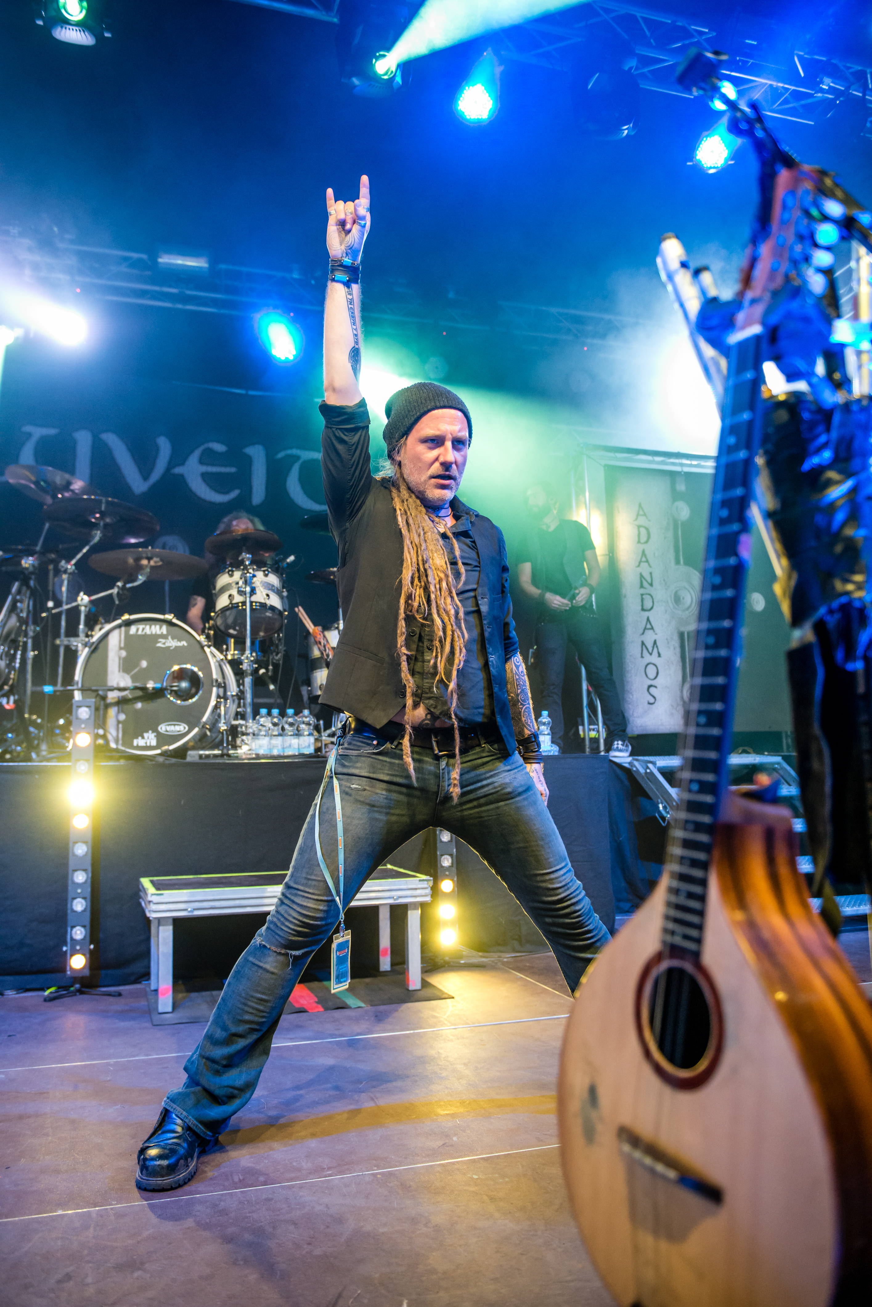 'Dong Open Air 2015; Neukirchen-Vluyn Halde Norddeutschland': 'Eluveitie'